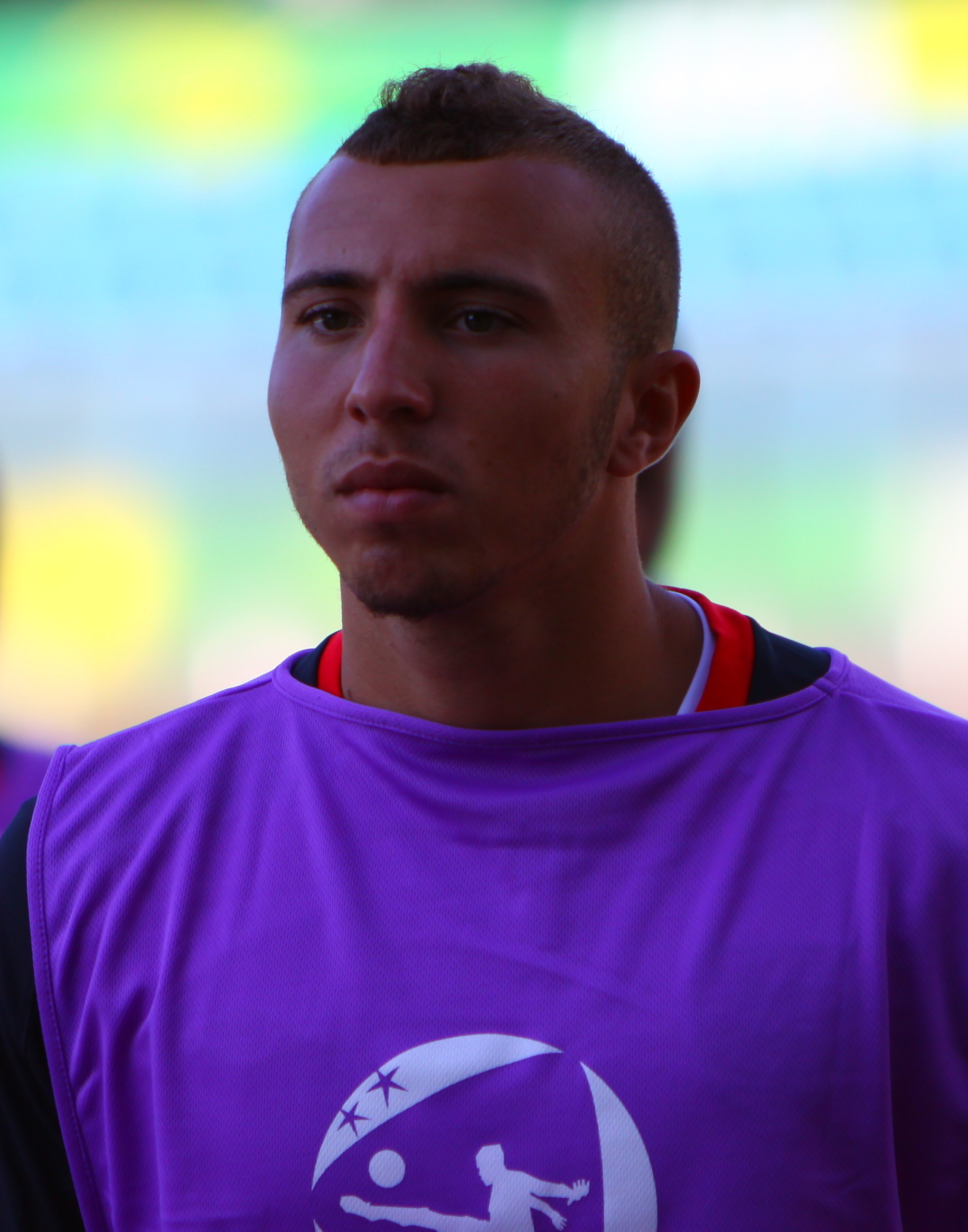 Hallam Hope